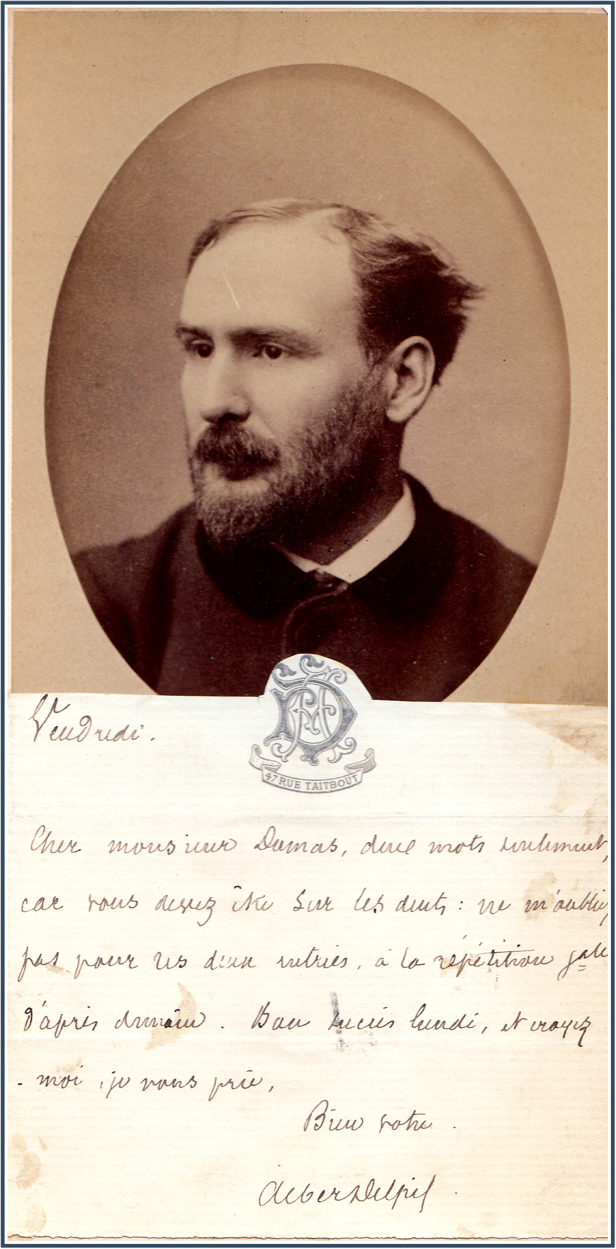 Фотография с письмом Александру Дюма отцу. 1880г.